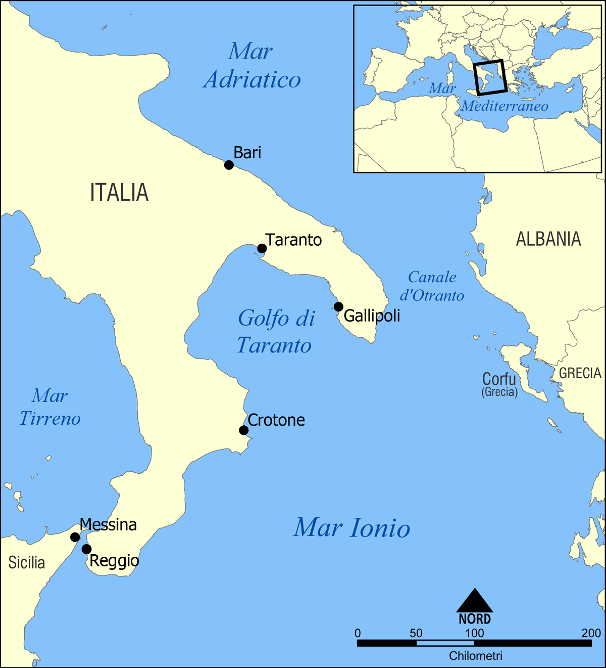 Rifatta sulla versione inglese